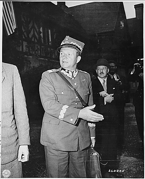 Marszałek Rola-Żymierski podczas konferencji poczdamskiej